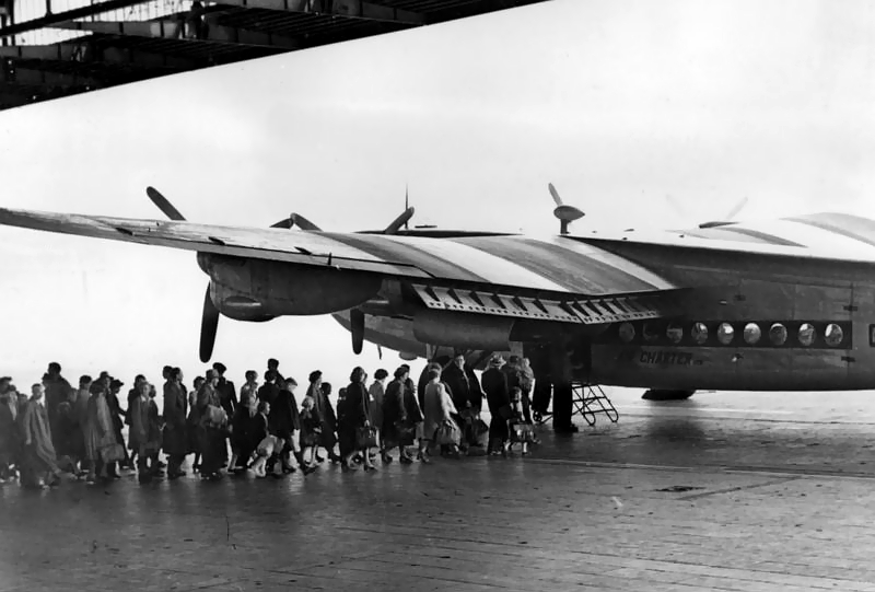 West Berlin-Tempelhof Sowjetzonen-Flüchtlinge werden in die Bundesrepublik ausgeflogen